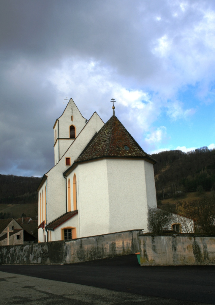 Kirche Hornussen, Schweiz